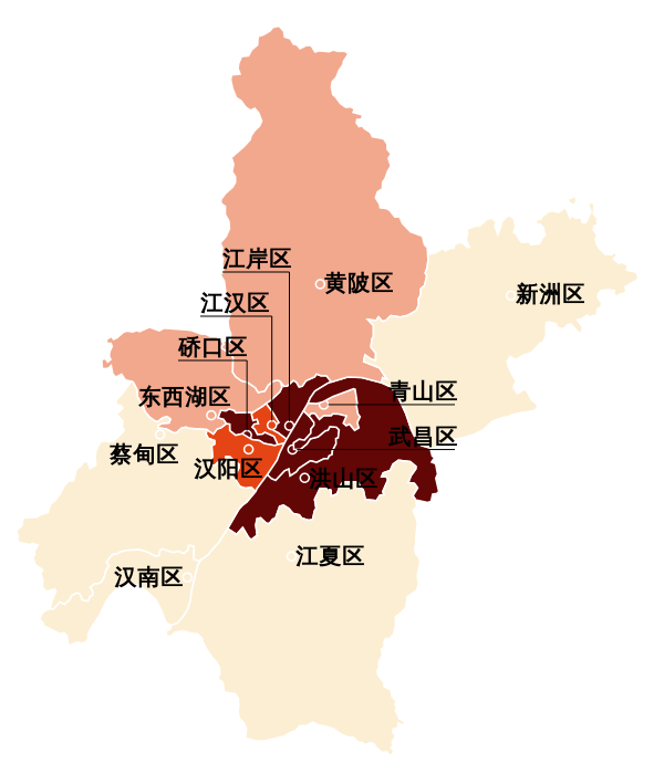 武汉市新冠肺炎按行政区统计的累计确诊病例分布